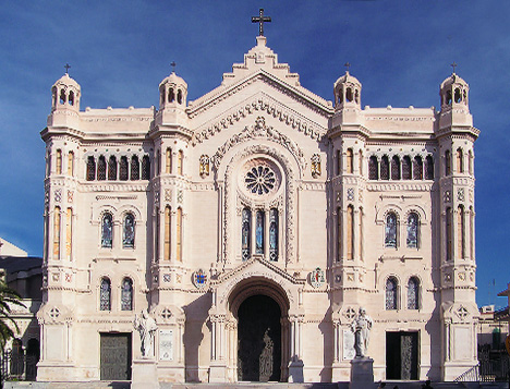 Reggio Calabria chatedral